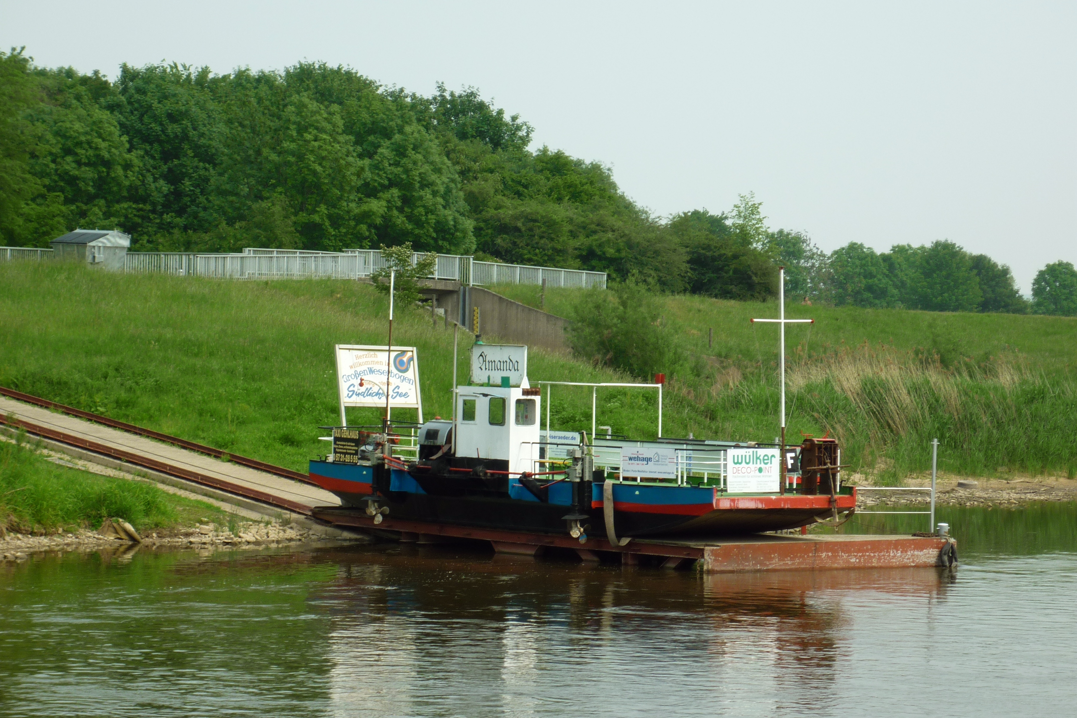 Personenfähre am Großen Weserbogen (Bad Oeynhausen). Antrieb mit zwei Propellern. Fähre ist wegen Niedrigwasser im Mai 2011 außer Betrieb.